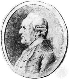 Portrait of Wilhelm Friedemann Bach